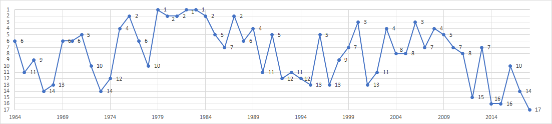 Tabellenplatzierungen zum Saisonende des Hamburger SV seit Einführung der Bundesliga 1963/64